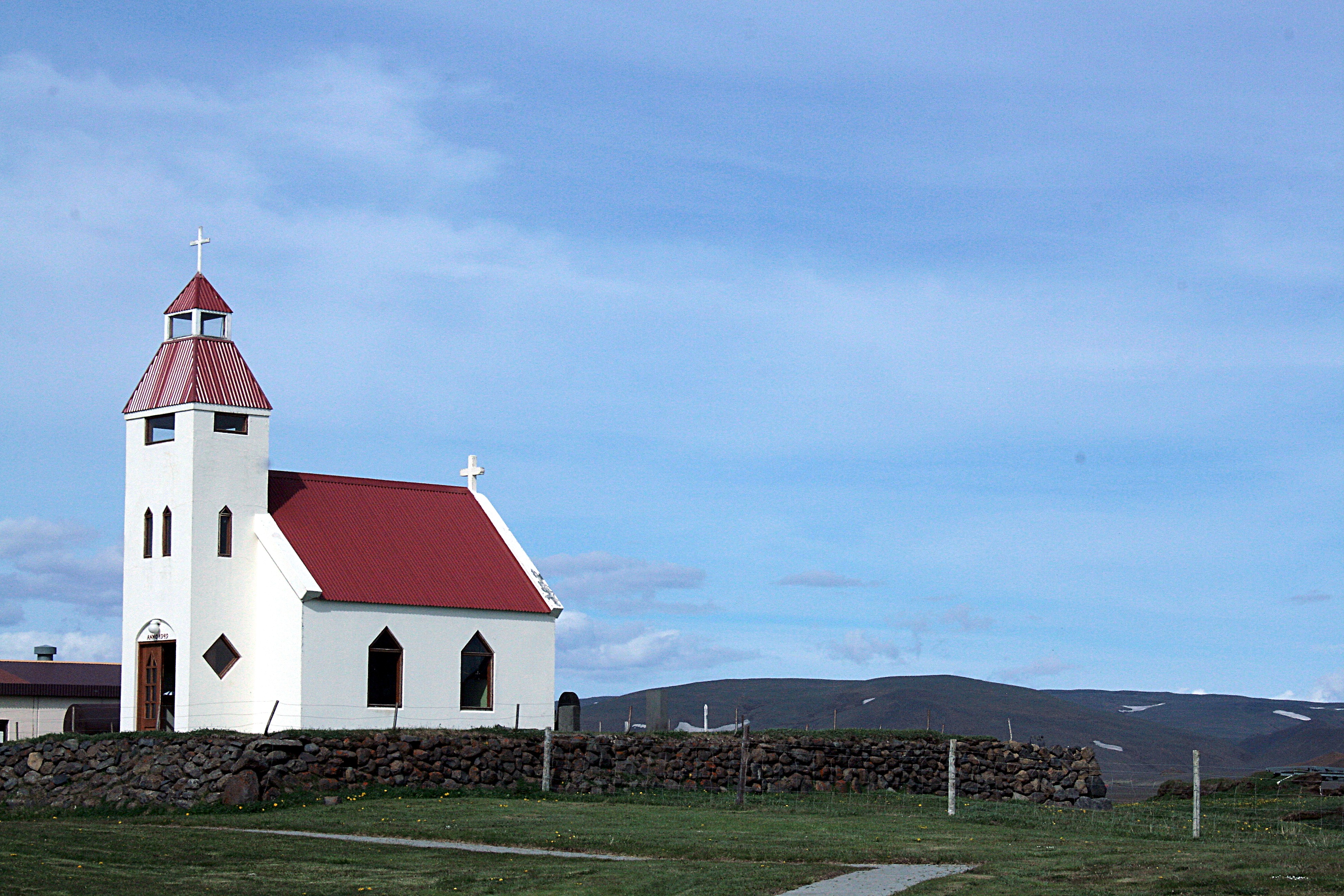 Bauernsiedlung Möðrudalur